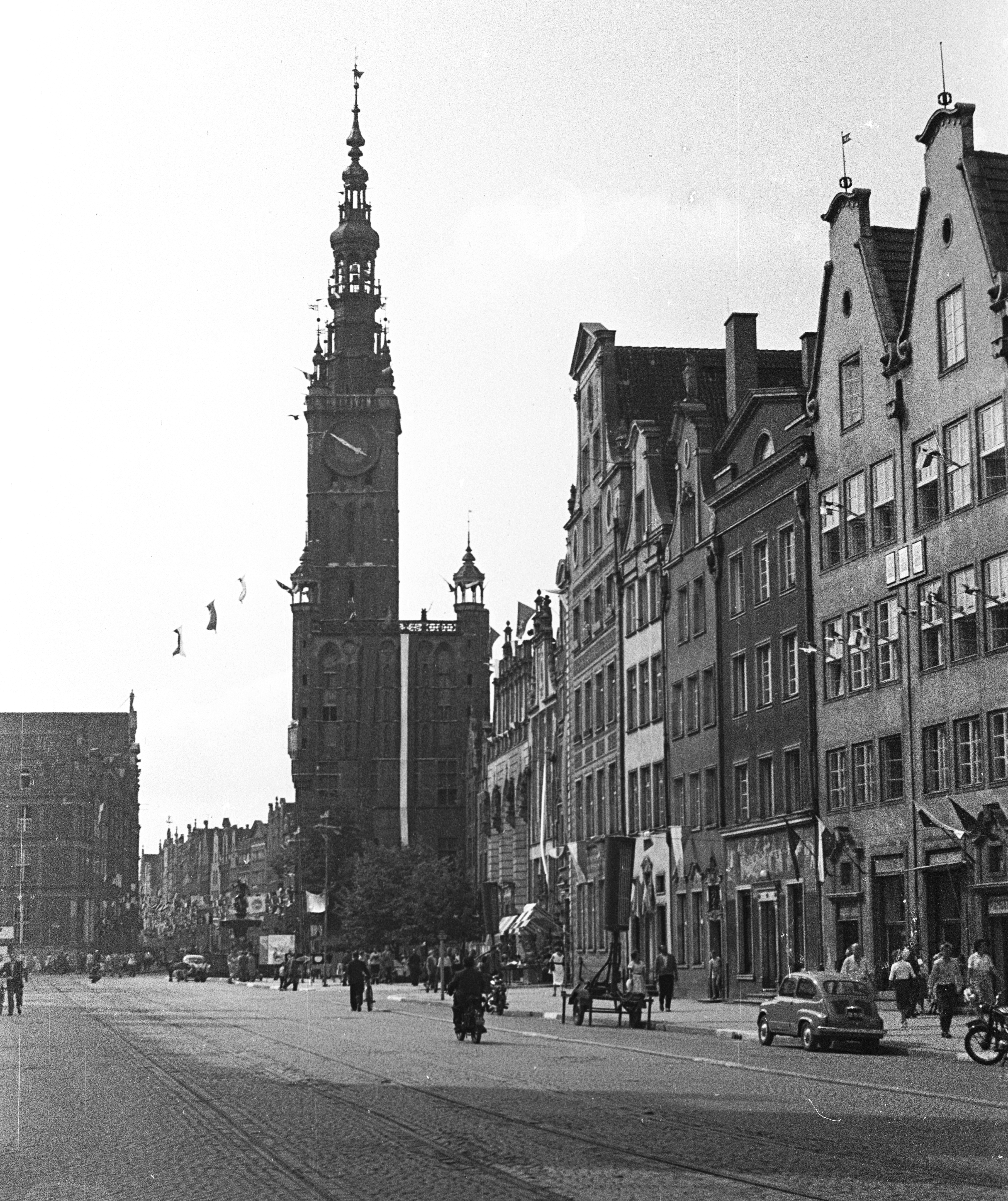 Hosszú Piac (Dlugi Targ), Városháza. Location: Poland, Gdansk Title: Hosszú Piac (Dlugi Targ), Városháza.